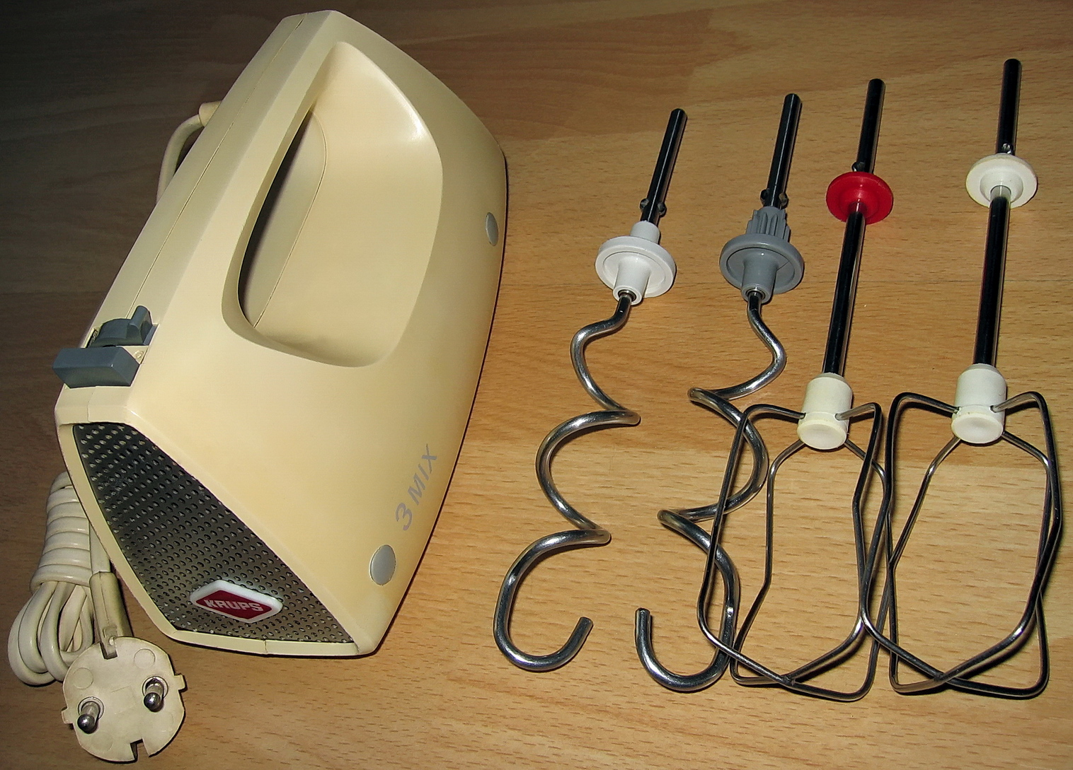 Handrührgerät der Marke Krups, Type 321, Baujahr ca. baujahr 1970, 100W elektrische Leistungsaufnahme.